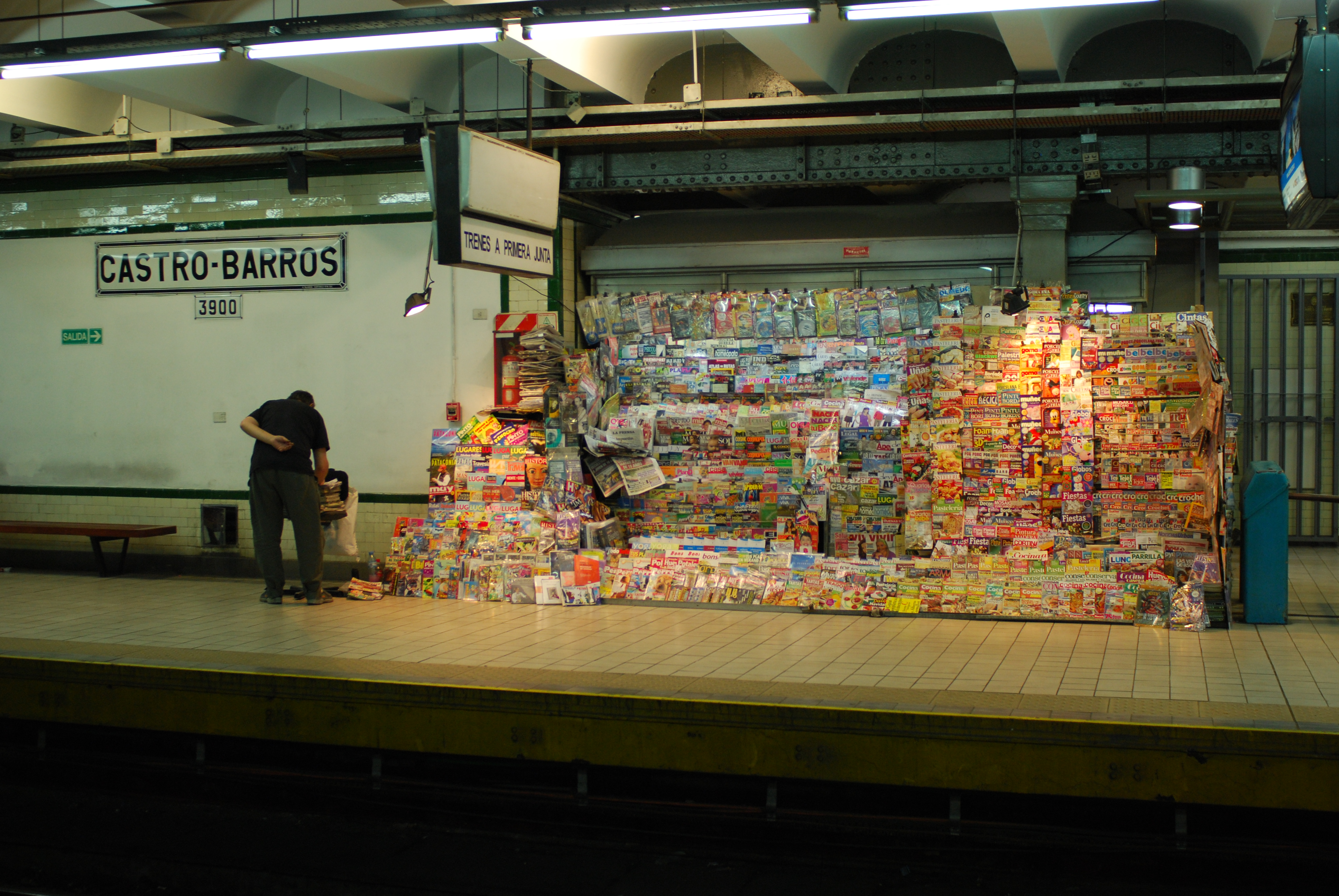 Kiosco de diarios en la estación Castro Barros de la línea A de subtes en Buenos Aires, Argentina.